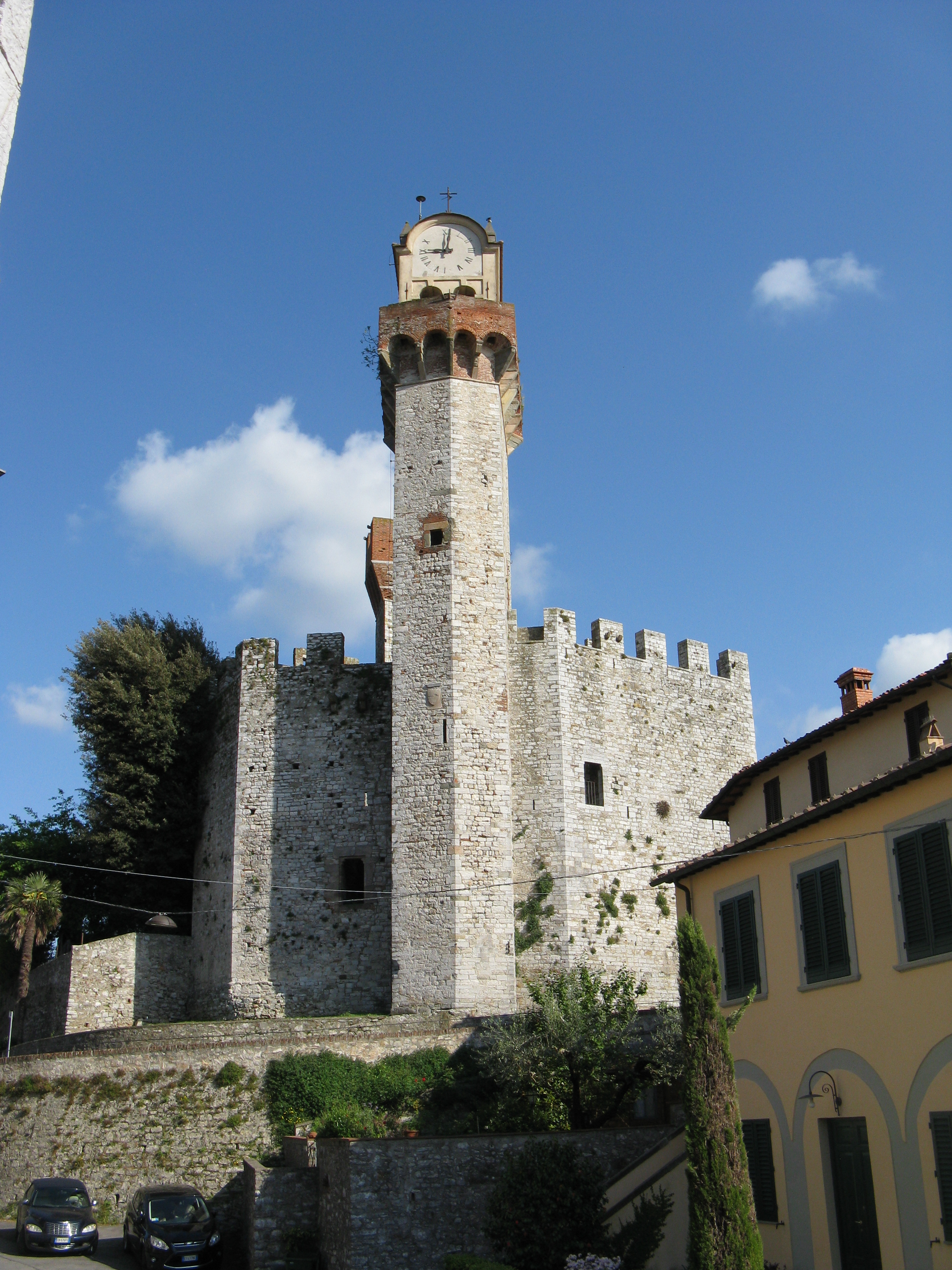 Il Castello di Nozzano con la torre dell'orologio principale.